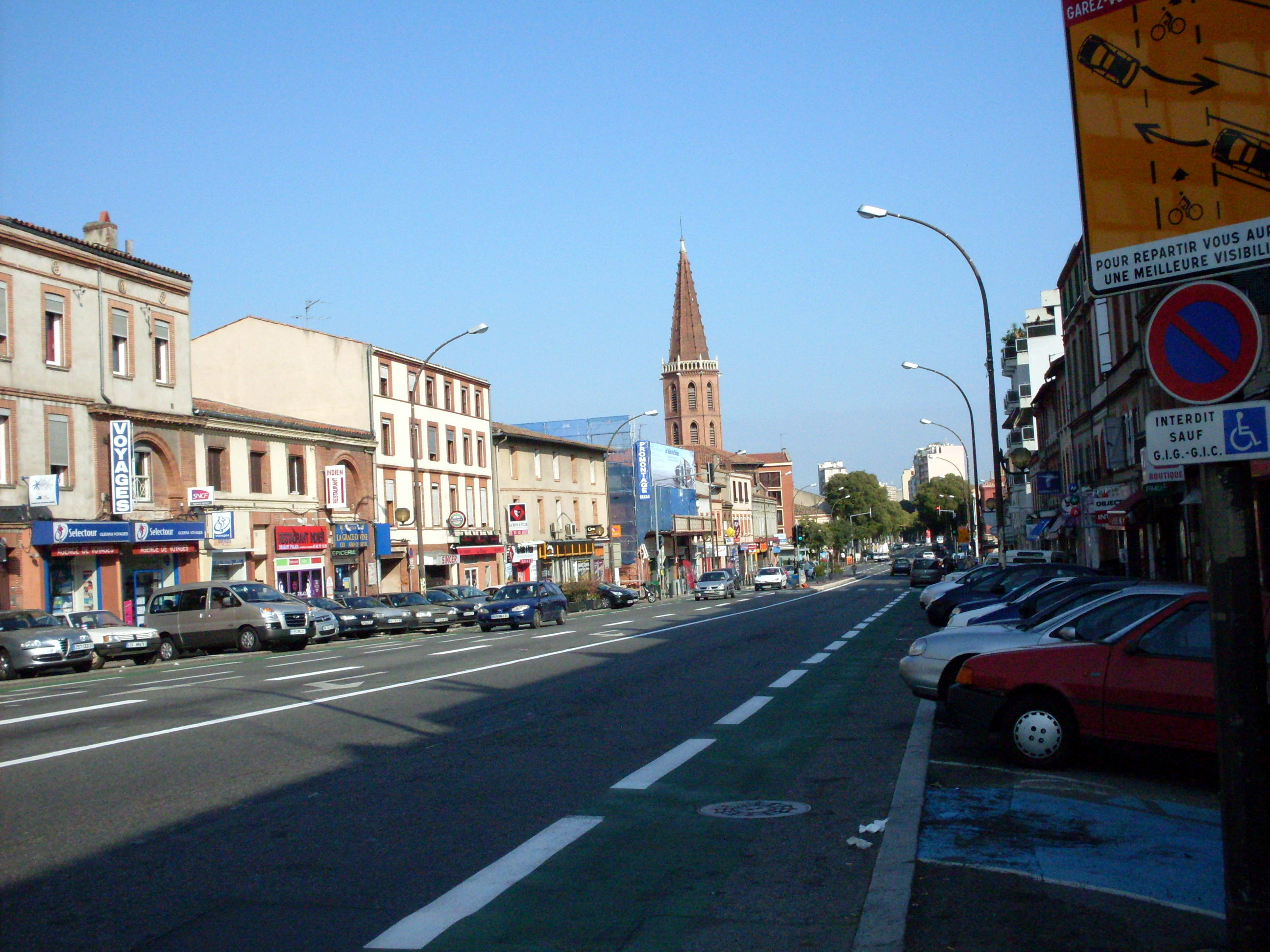 L'Avenue des Minimes à Toulouse (Haute-Garonne, France).